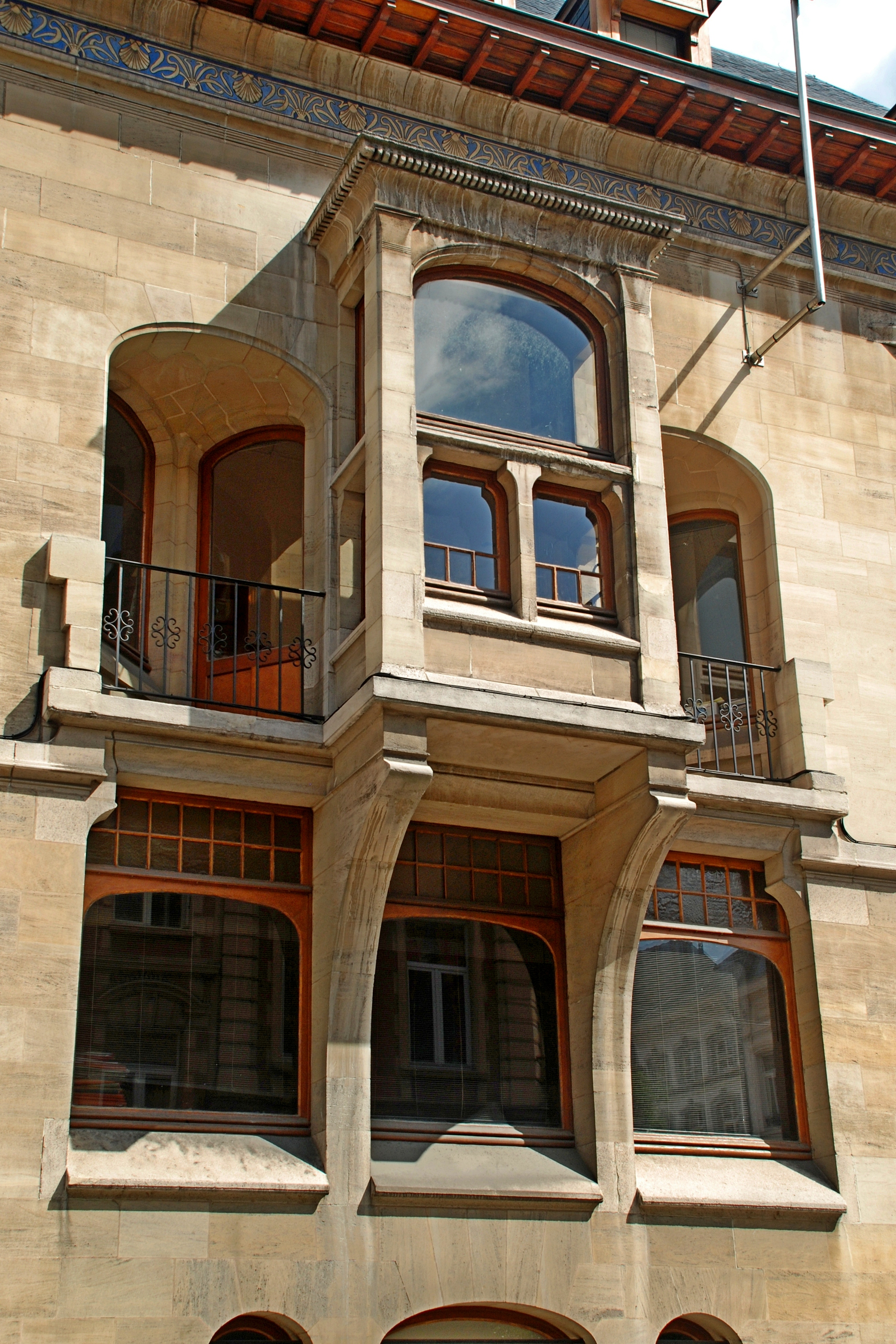 Belgique - Bruxelles - Hôtel Otlet